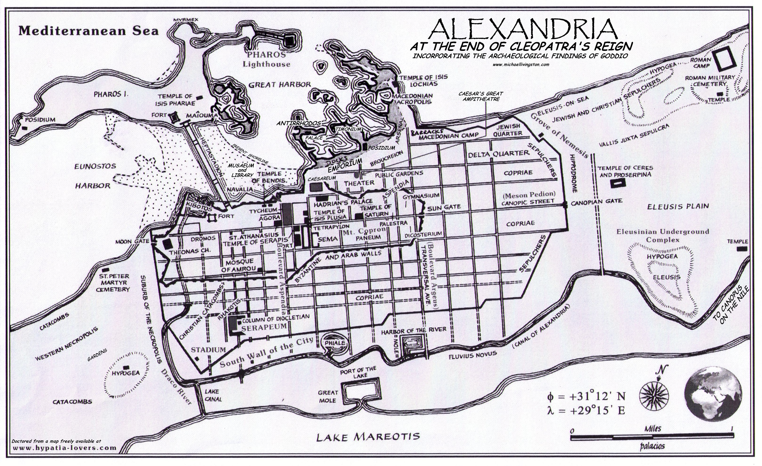 Ancient Alexandrina